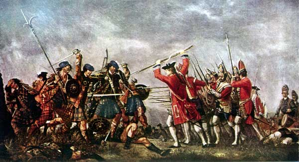 Die Schlacht bei Culloden am 16. April 1746. Gemälde von David Morier (1705-1770), 1746